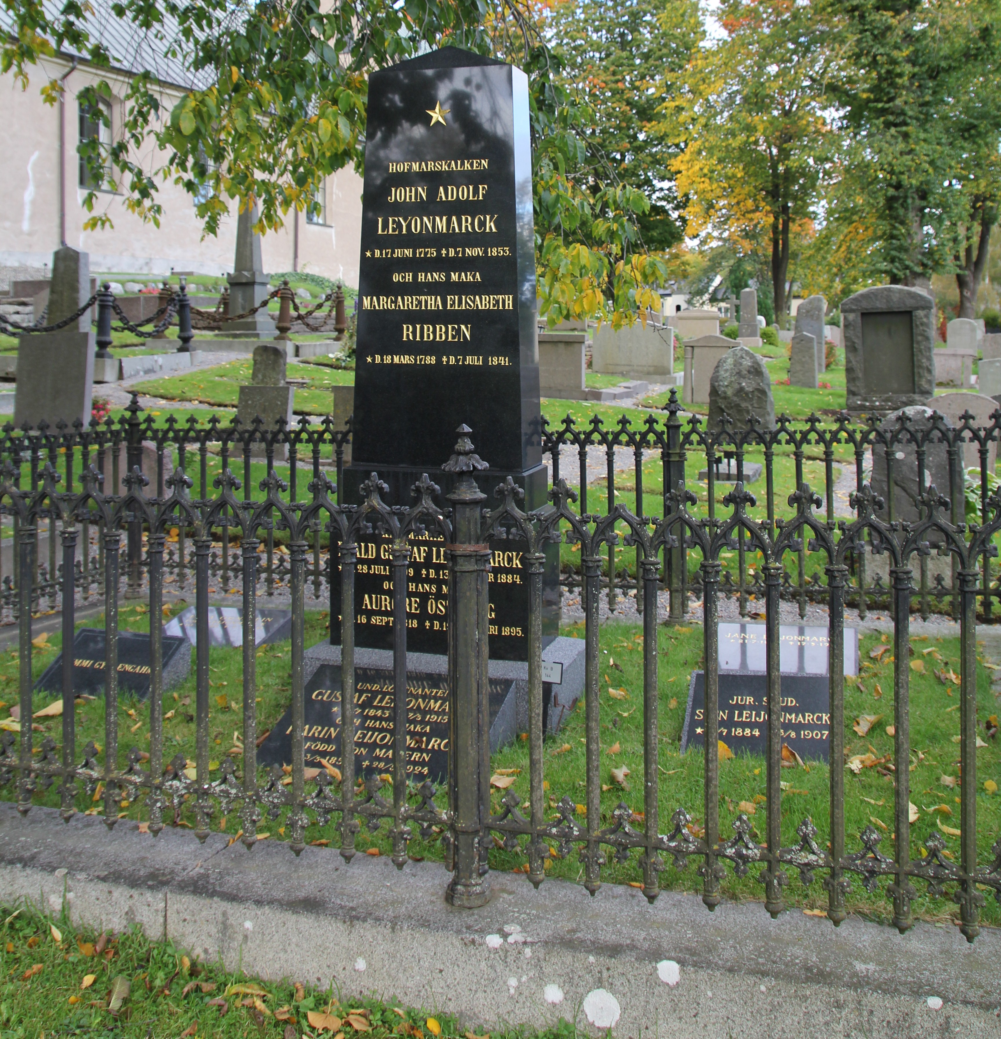 Brännkyrka kyrka i Stockholm. John Adolf Leyonmarcks grav.